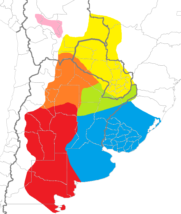 Mapa de Myiopsitta luchsi y las subespecies de Myiopsitta monachus. ██ Myiopsitta luchsi. ██ Myiopsitta monachus calita. ██ Área asignada a M. m. calita o M. m. cotorra según los autores. ██ Myiopsitta monachus cotorra. ██ Área asignada a M. m. monachus o M. m. cotorra según los autores. ██ Myiopsitta monachus monachus.